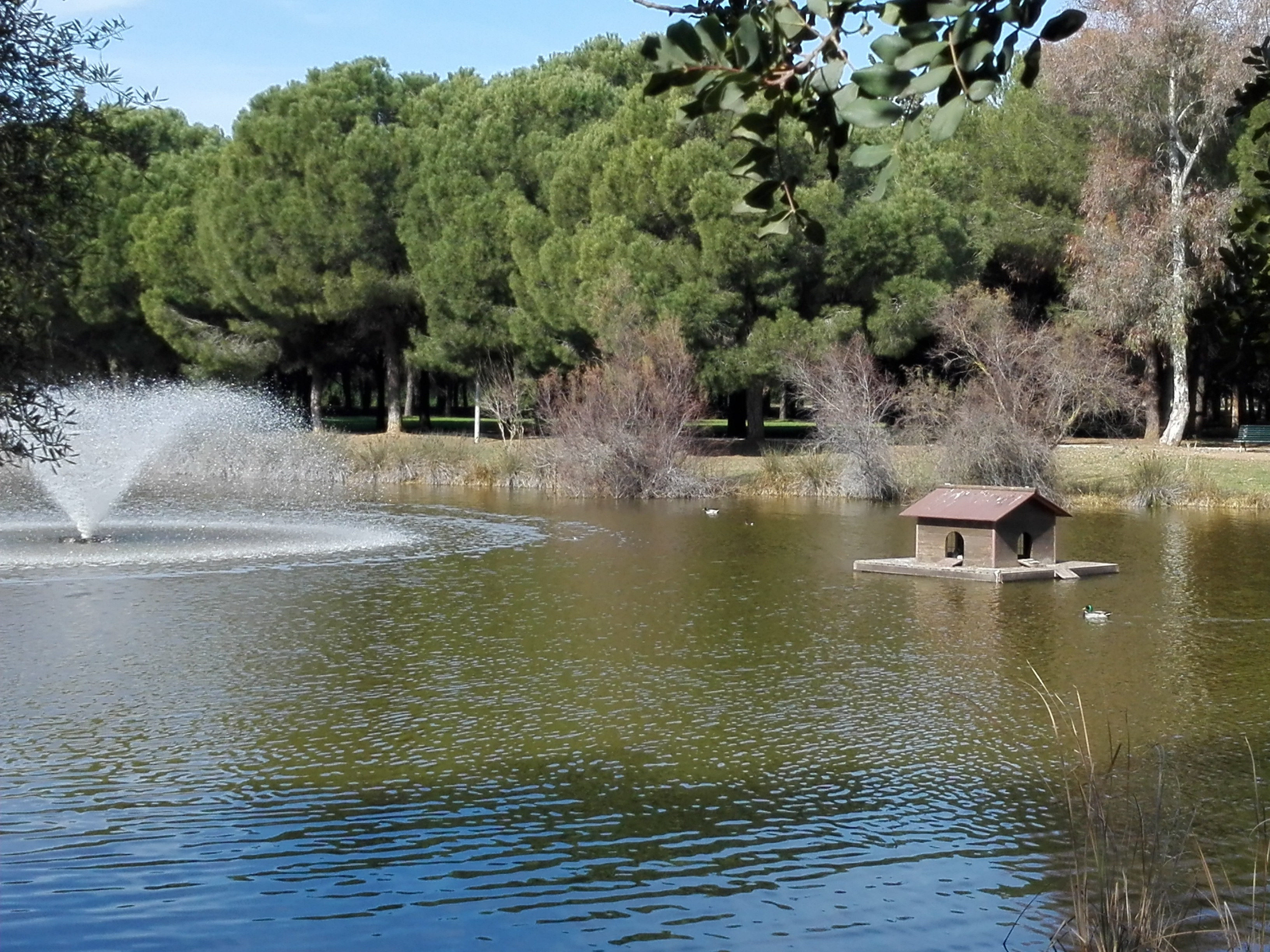 Diseñado en 1997 por Javier Yuste Zazo, el Parque Infanta Elena ocupa una superficie de 35.000m2. En su interior hay un lago con ansares. Está en la ciudad de Sevilla, en la zona denominada Sevilla Este.